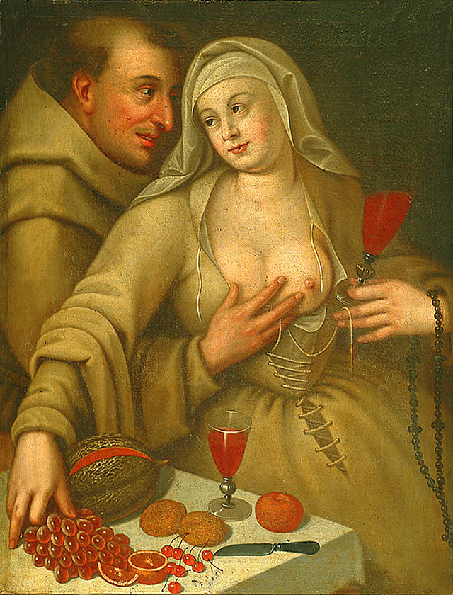 Rencontre galante entre un moine et une religieuse